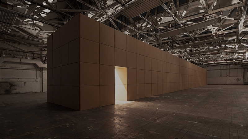 318 prepared dc-motors, cork balls, cardboard boxes 100x100x100cm⎢Zimoun 2013. Installation view: Opernwerkstätten Berlin, Germany.